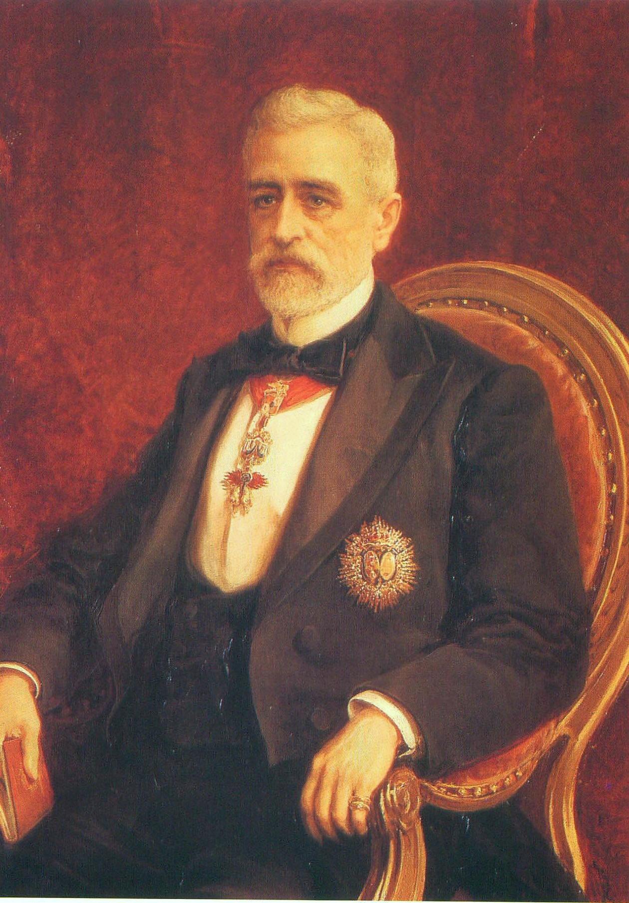 Retrato del político y jurista español Eugenio Montero Ríos (1832-1914), que fue ministro de Gracia y Justicia durante el reinado de Amadeo I y ministro de Fomento, presidente del Tribunal Supremo y presidente del Consejo de Ministros de España durante la regencia de María Cristina de Habsburgo-Lorena.